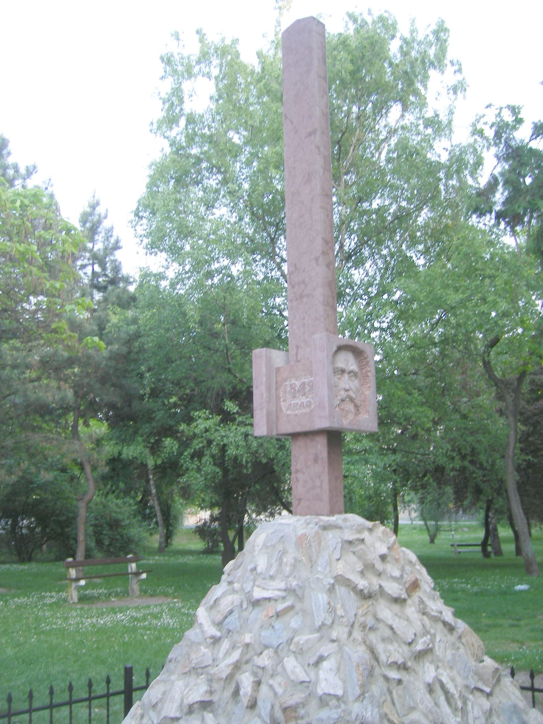 Komárom - Aradi vértanúk emlékműve az Anglia-parkban